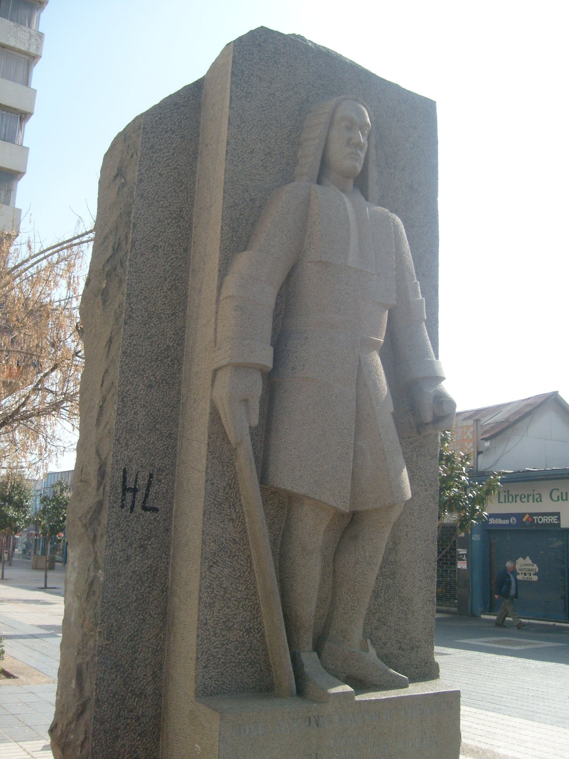 Manso de Velasco Gouveneur (Rancagua, Chile)